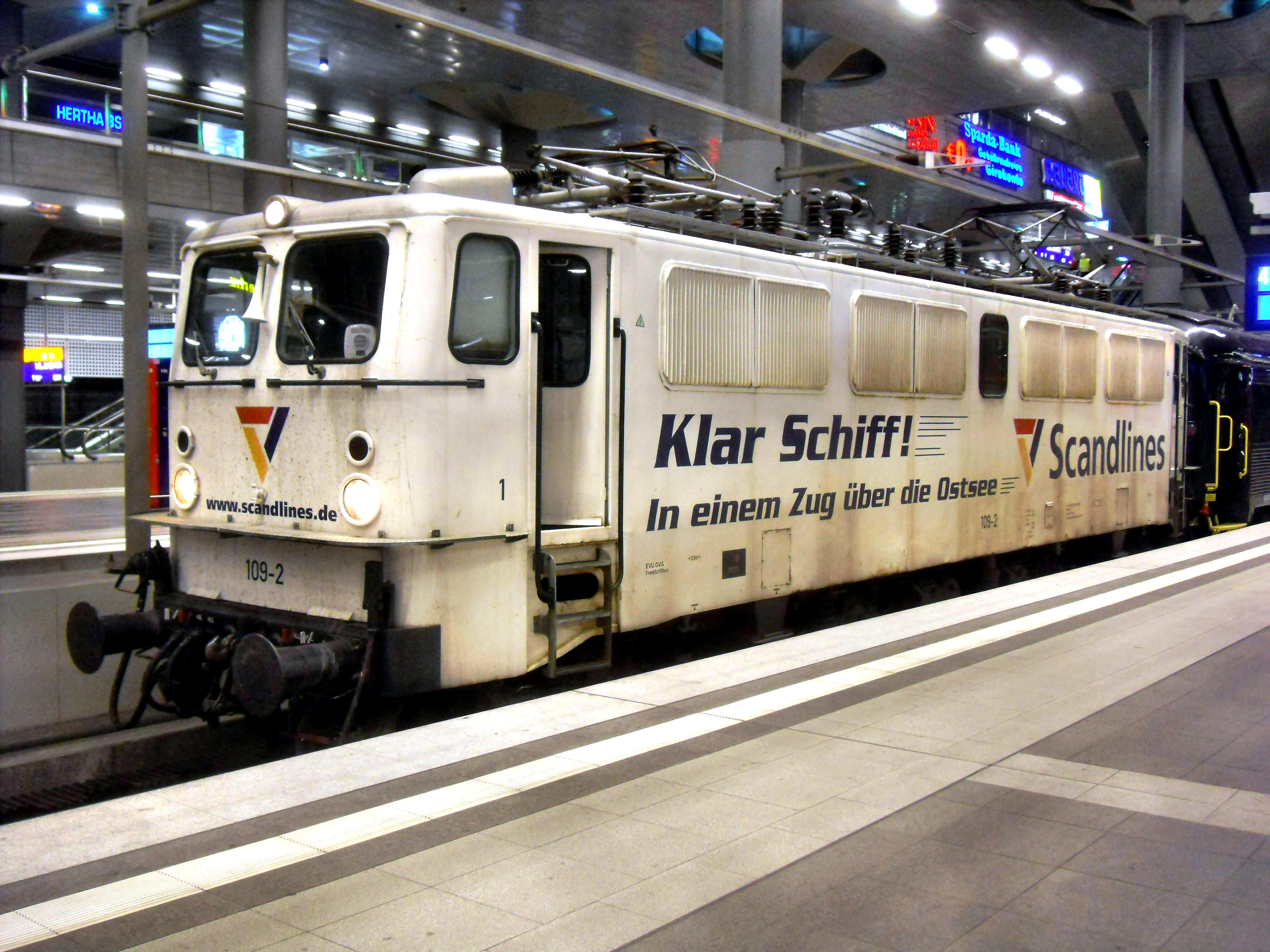 EuroNight im Berliner Hauptbahnhof (Deutschland) mit GVG-Lokomotive 109-2 mit Scandlines-Schriftzug im Berliner Hauptbahnhof auf dem Weg nach Malmö (Schweden)